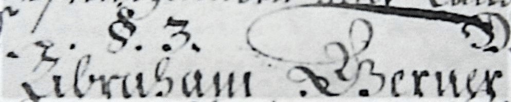 Abraham Gerner, Schreibweise des G beachten , fälschlich oft als B gelesen, Speyer 1664